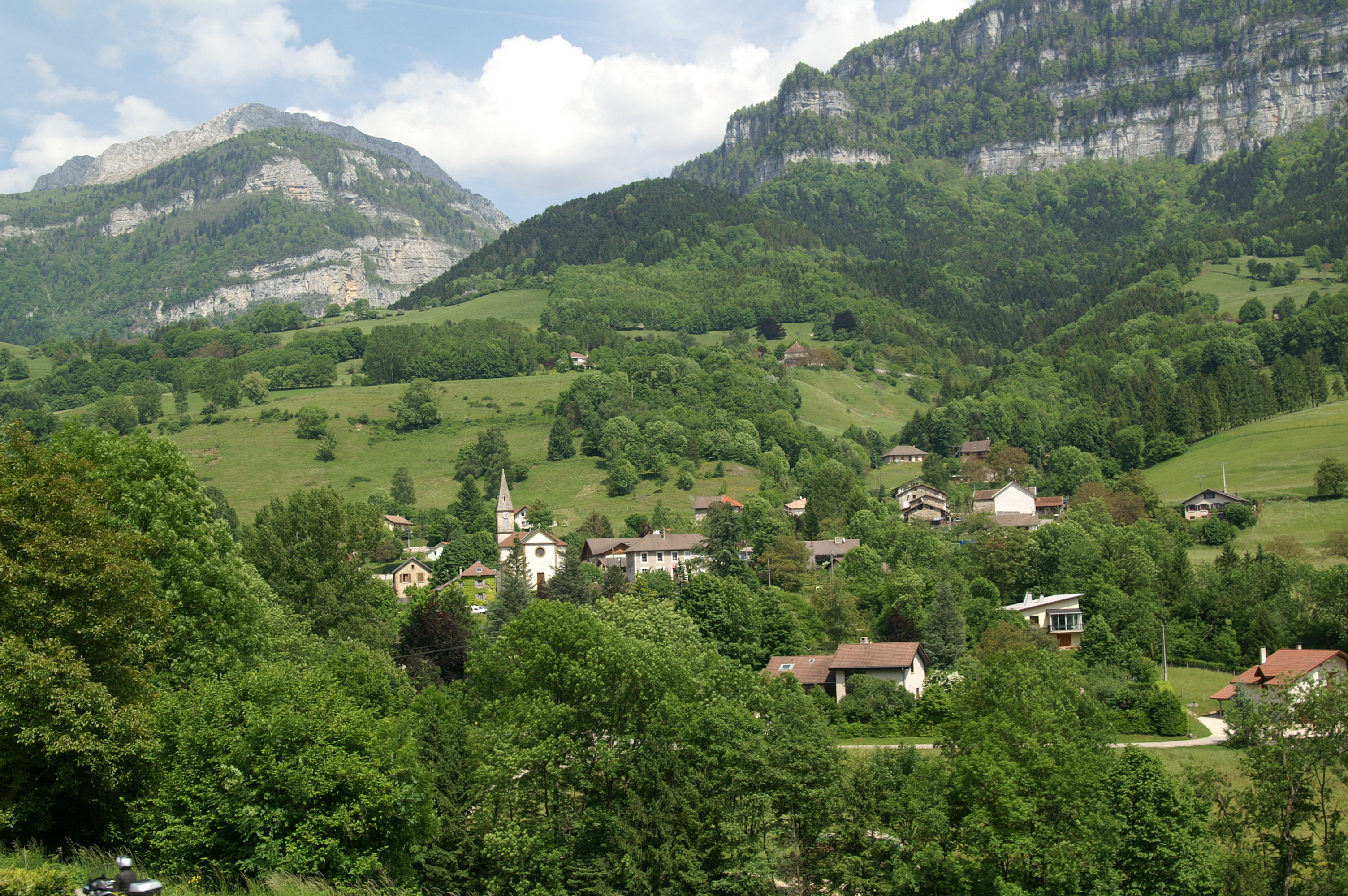 vue du village de Pommiers la Placette prise de la route entre Voreppe et le Col de la PLacette